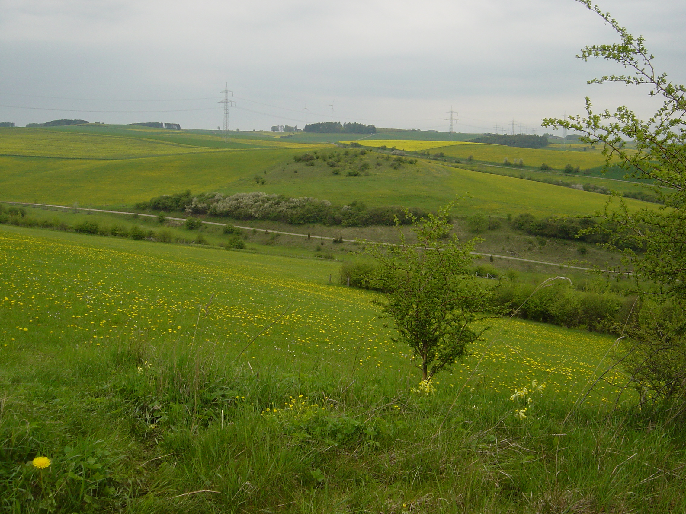 Nordwestbereich vom Naturschutzgebiet Glockengrund; LSG Rotes Land im Hintergrund